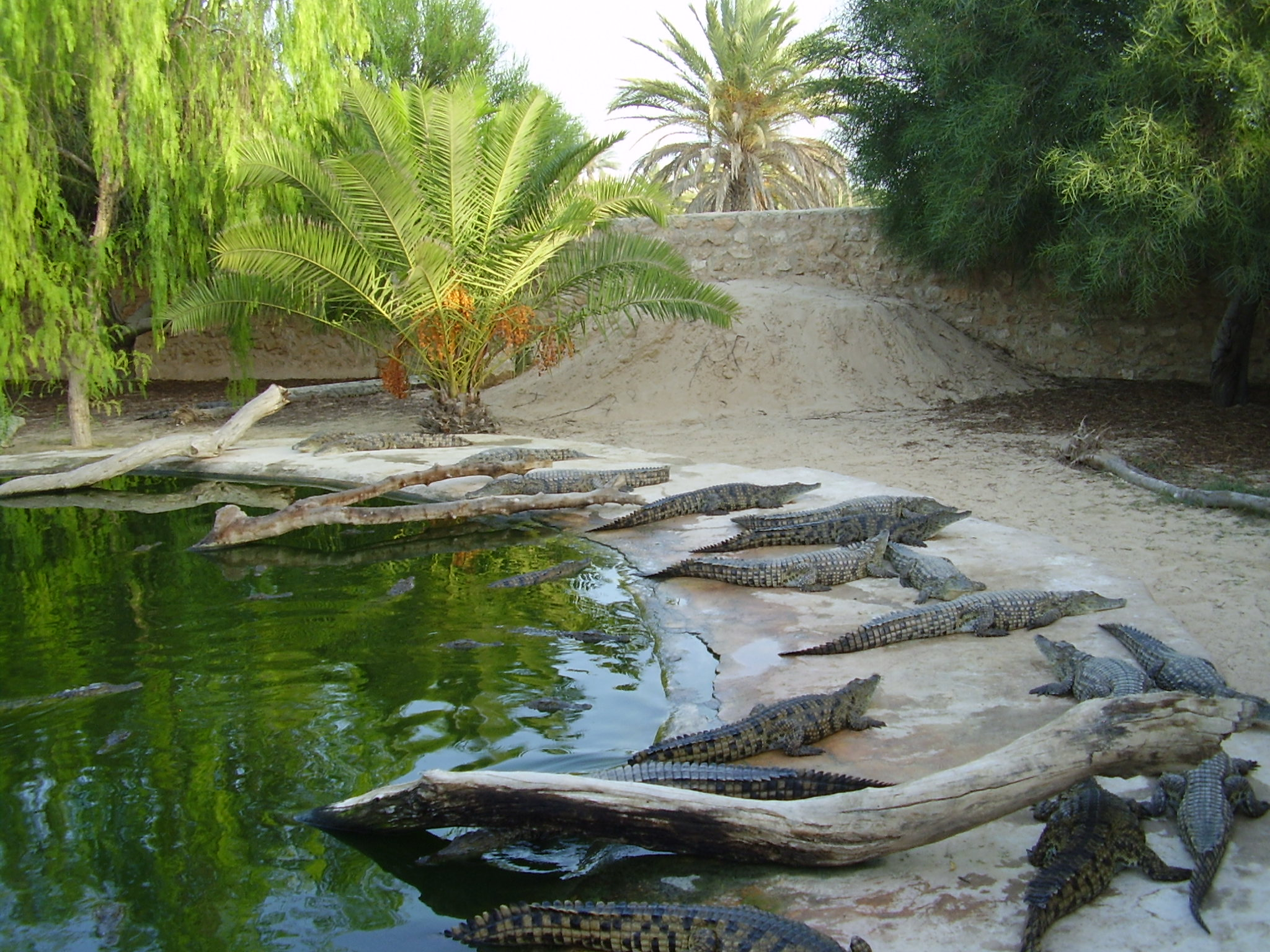 Krokodýl nilský v chovné stanici v parku Djerba Explore